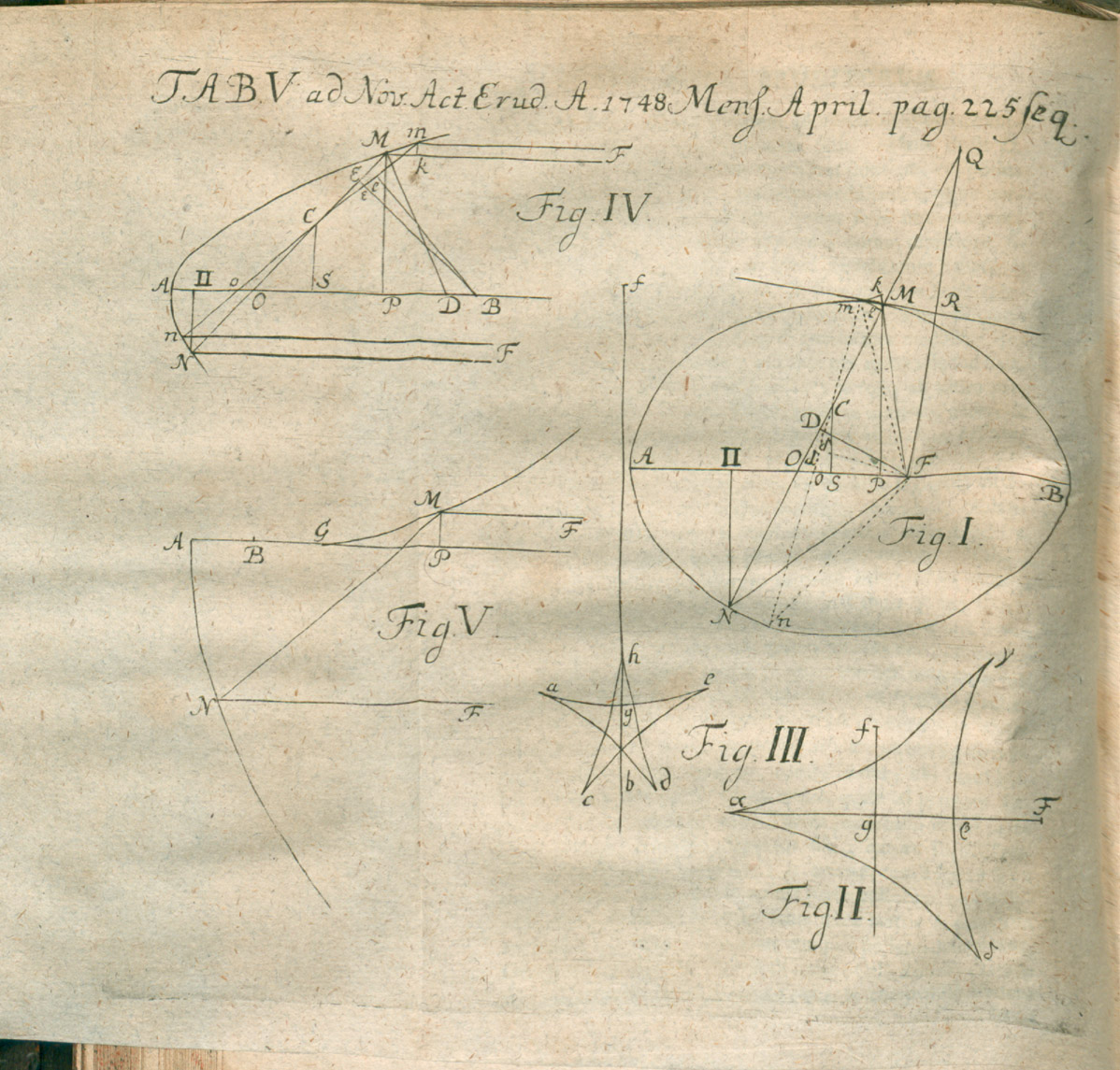 Illustration